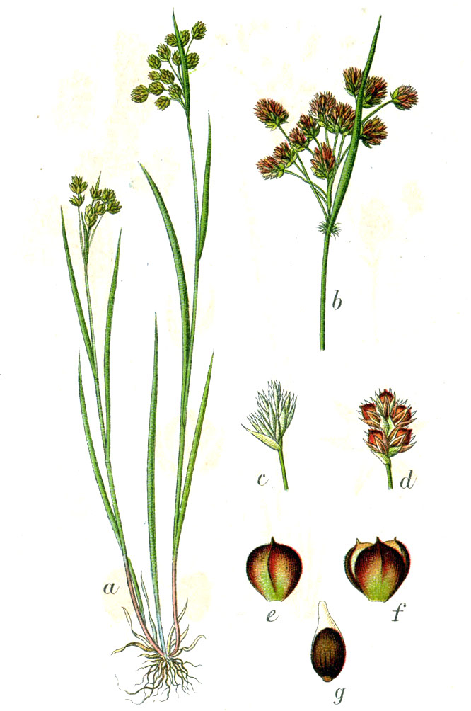 Tela-Botanica: Luzula multiflora var. pallescens W.D.J.Koch, syn. Luzula pallescens Hoppe Original Caption Blasses Hasenbrot, Luzula pallescens